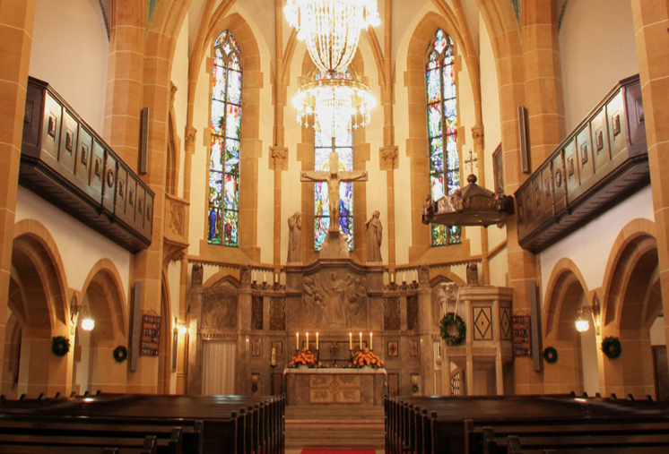 Blick in den Westchor der Heilig-Kreuz-Kirche in Röthenbach an der Pegnitz (Foto basiert auf einem von Werner Holzinger, Röthenbach, zur Verfügung gestellten Original)